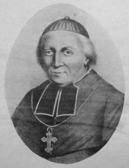 Mathias Le Groing de La Romagère (* 5. Dezember 1756 in Saint-Sauvier; † 19. Februar 1841 in Saint-Brieuc) , französischer Bischof.